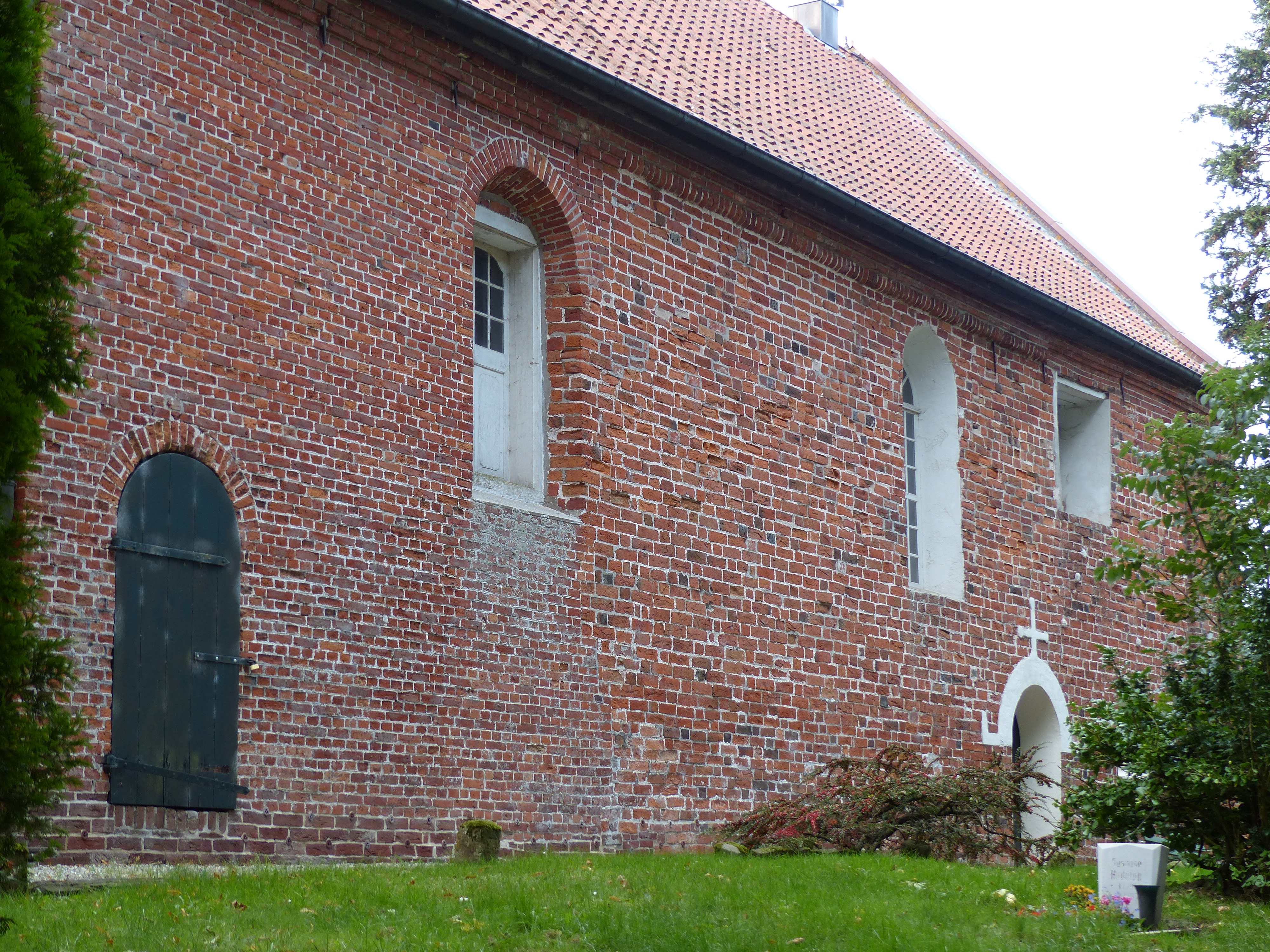 Nordseite der Backsteinkirche in Tossens